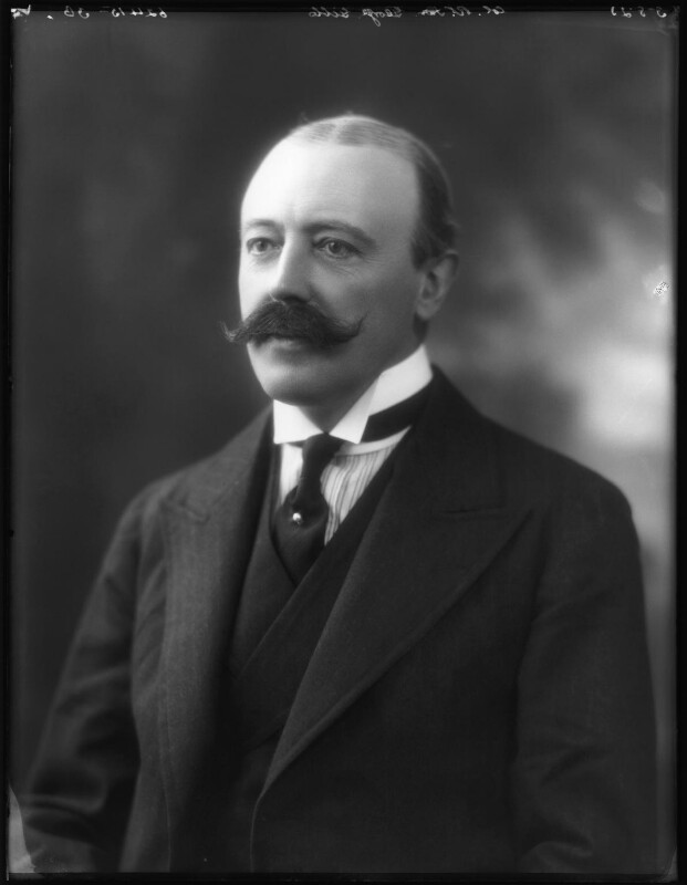 Lord Wraxall